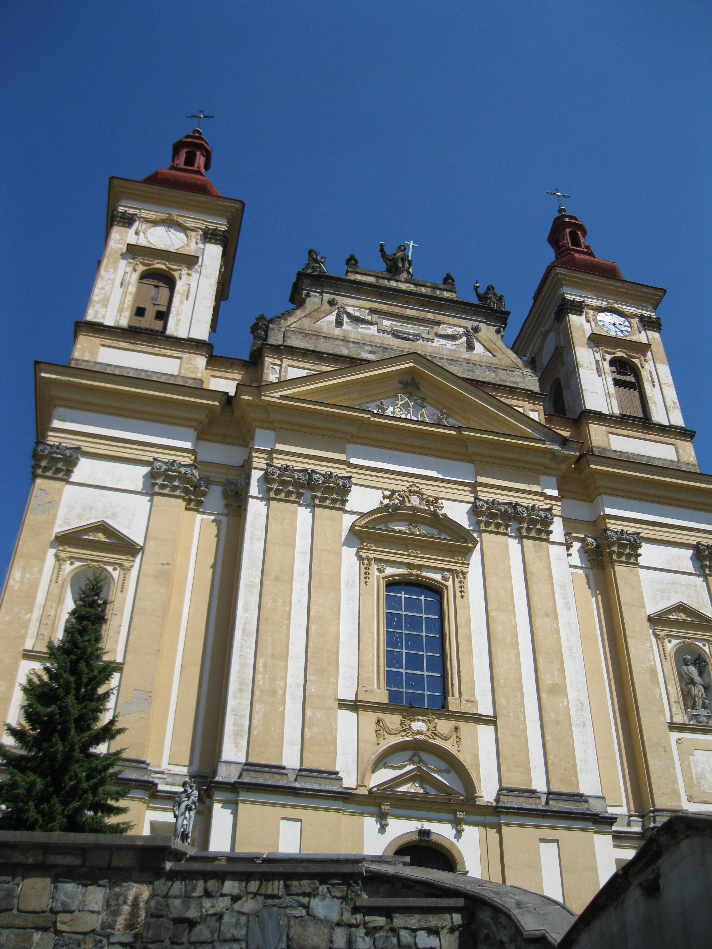 Kostel Zvěstování P. Marie (Šternberk)